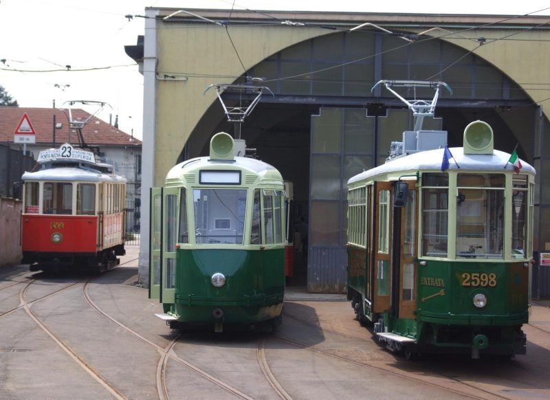 La 502 con 3104 e 2598 a Sassi per l'ATTS show del 6 Giugno 2010